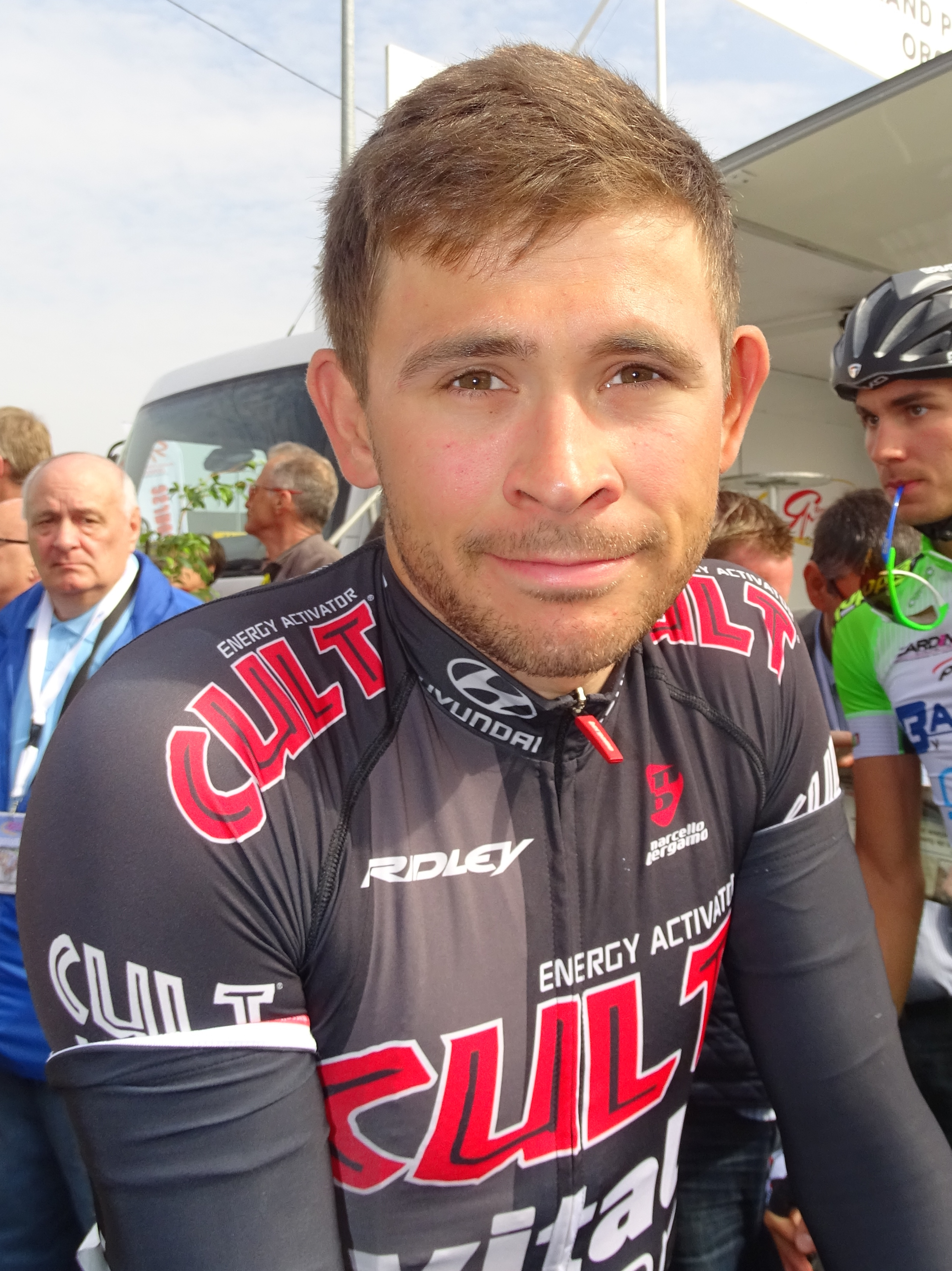 Reportage réalisé le jeudi 16 avril à l'occasion du départ et de l'arrivée du Grand Prix de Denain 2015 à Denain, Nord, Nord-Pas-de-Calais, France.